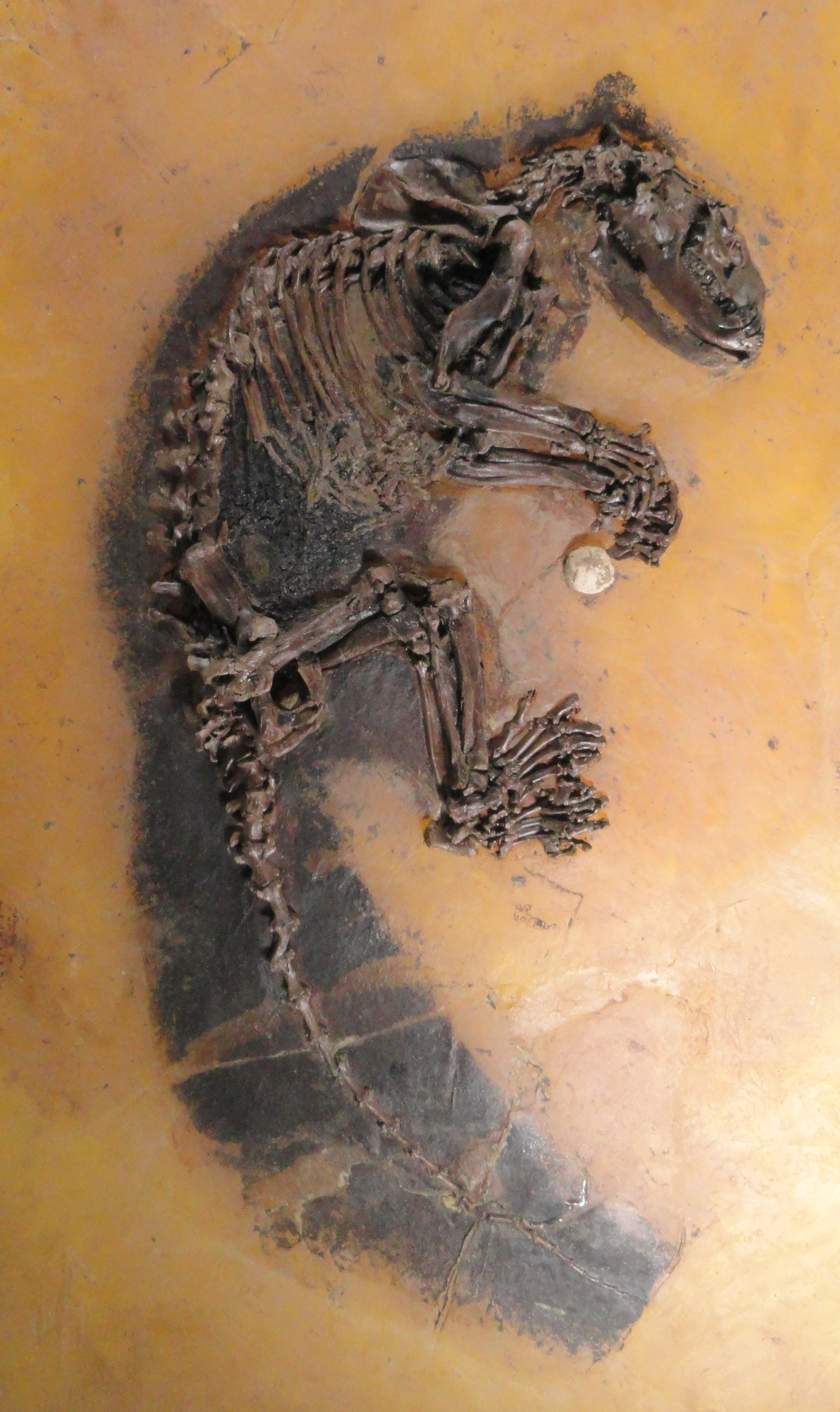 Exhibit in Naturmuseum Senckenberg, Frankfurt am Main, Germany.